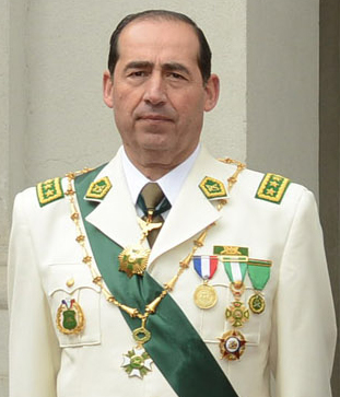 Gustavo Adolfo González Jure, (Santiago, 25 de mayo de 1955). Abogado y oficial de Carabineros de Chile, actual General Director de Carabineros de Chile.